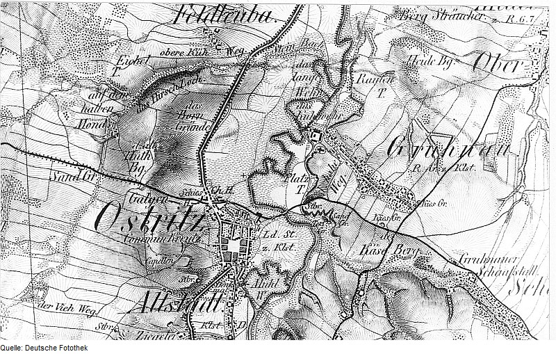 Original image description from the Deutsche Fotothek Ostritz. Oberreit, Sect. Zittau, 1844/46